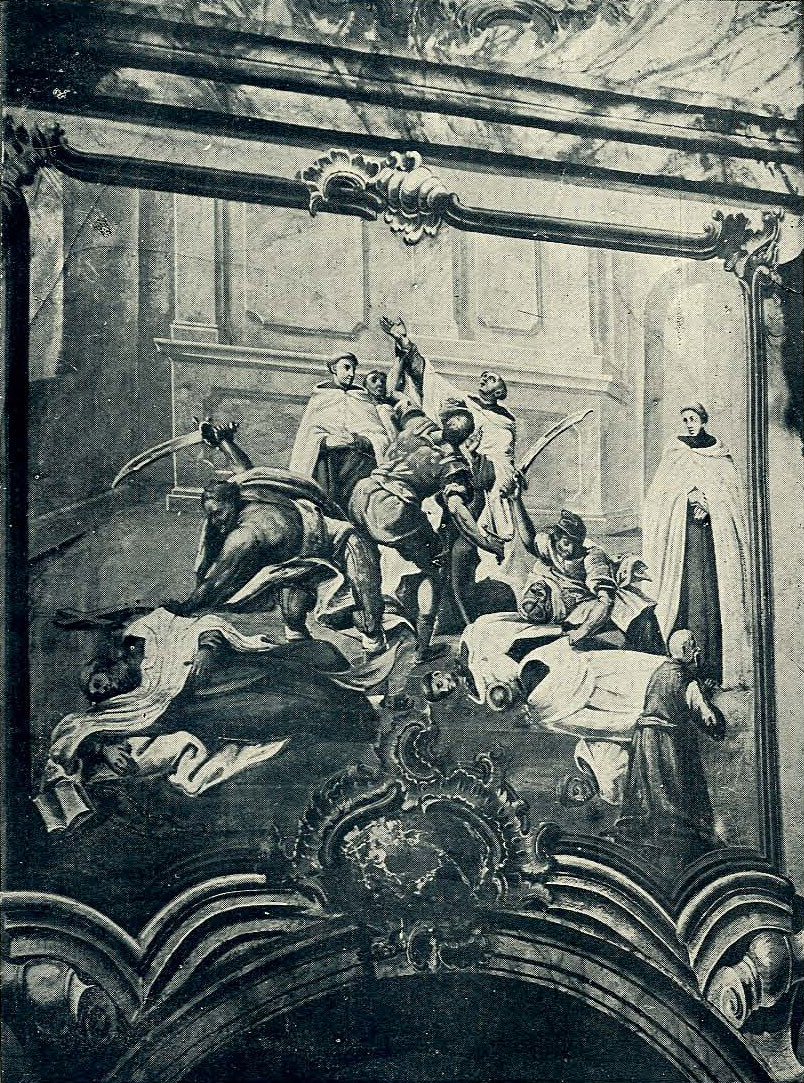 Беларуская (тарашкевіца): Амсьціслаў (Amścisłaŭ). Фрэскі ў касьцёле кармэлітаў: разаніна сьвятароў маскоўскімі войскамі